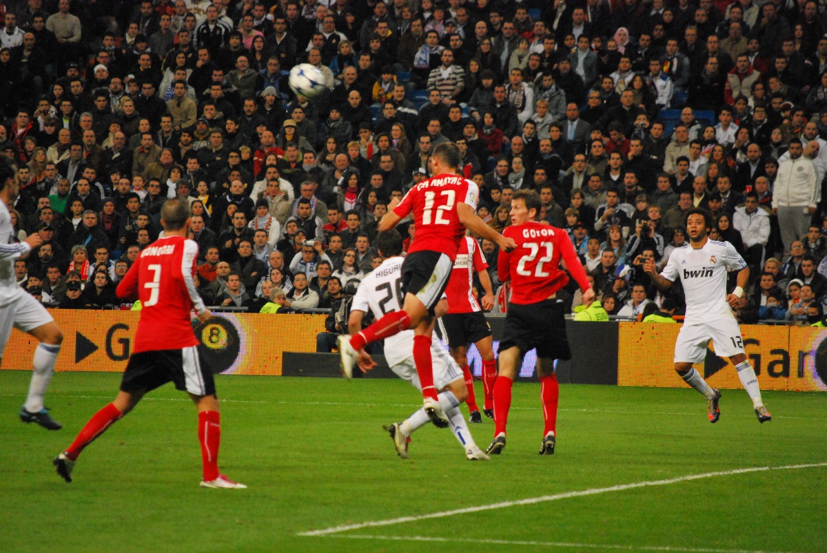 madrid-murcia_20101110_214412